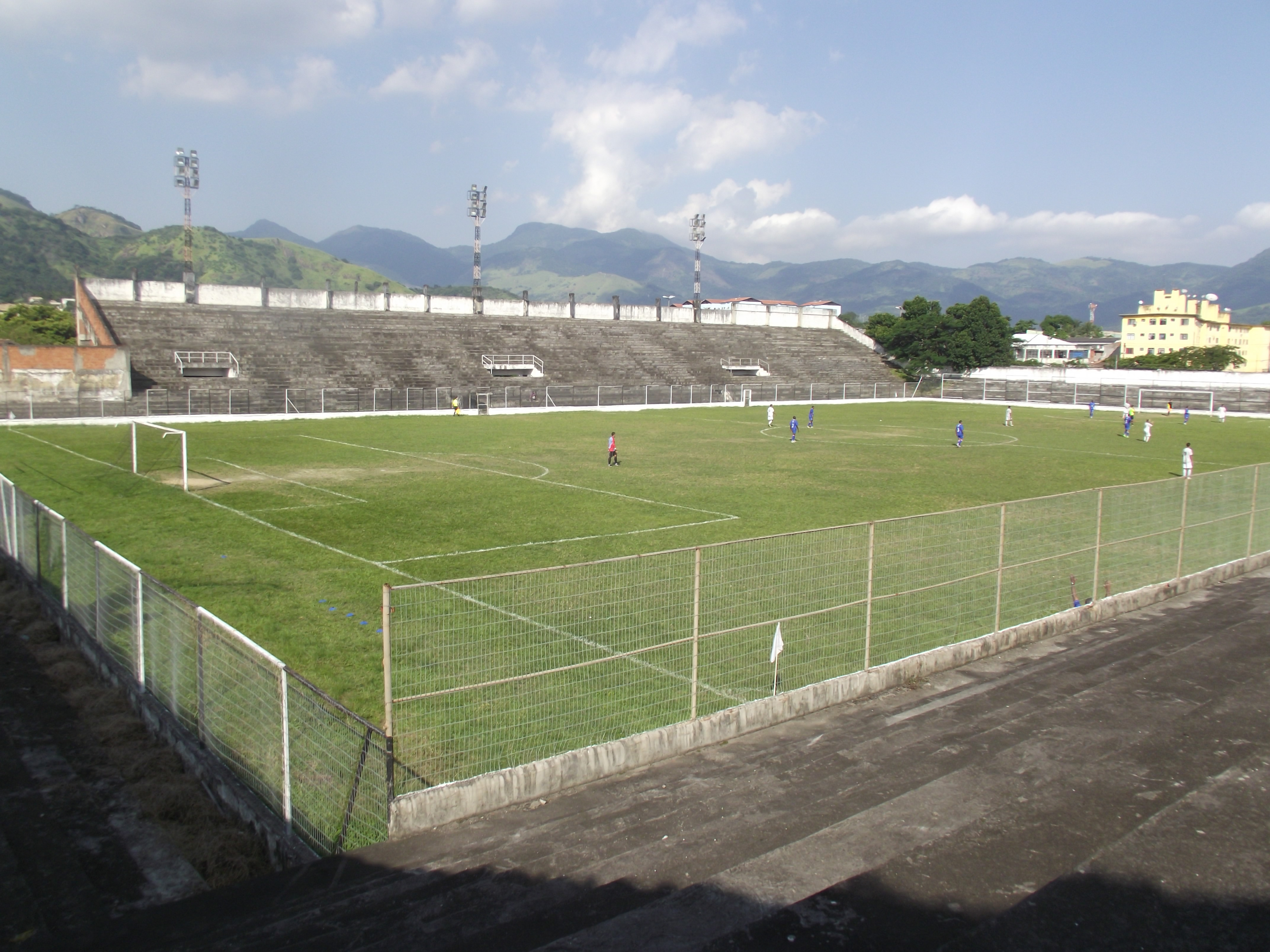 Estádio Ítalo del Cima, Campo Grande, Rio de Janeiro (cidade/city).